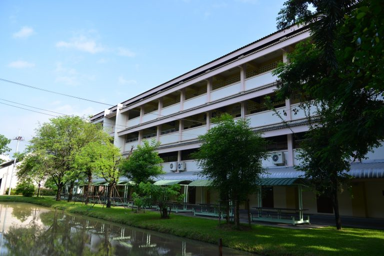 อาคารเรียน ๔ ชั้น